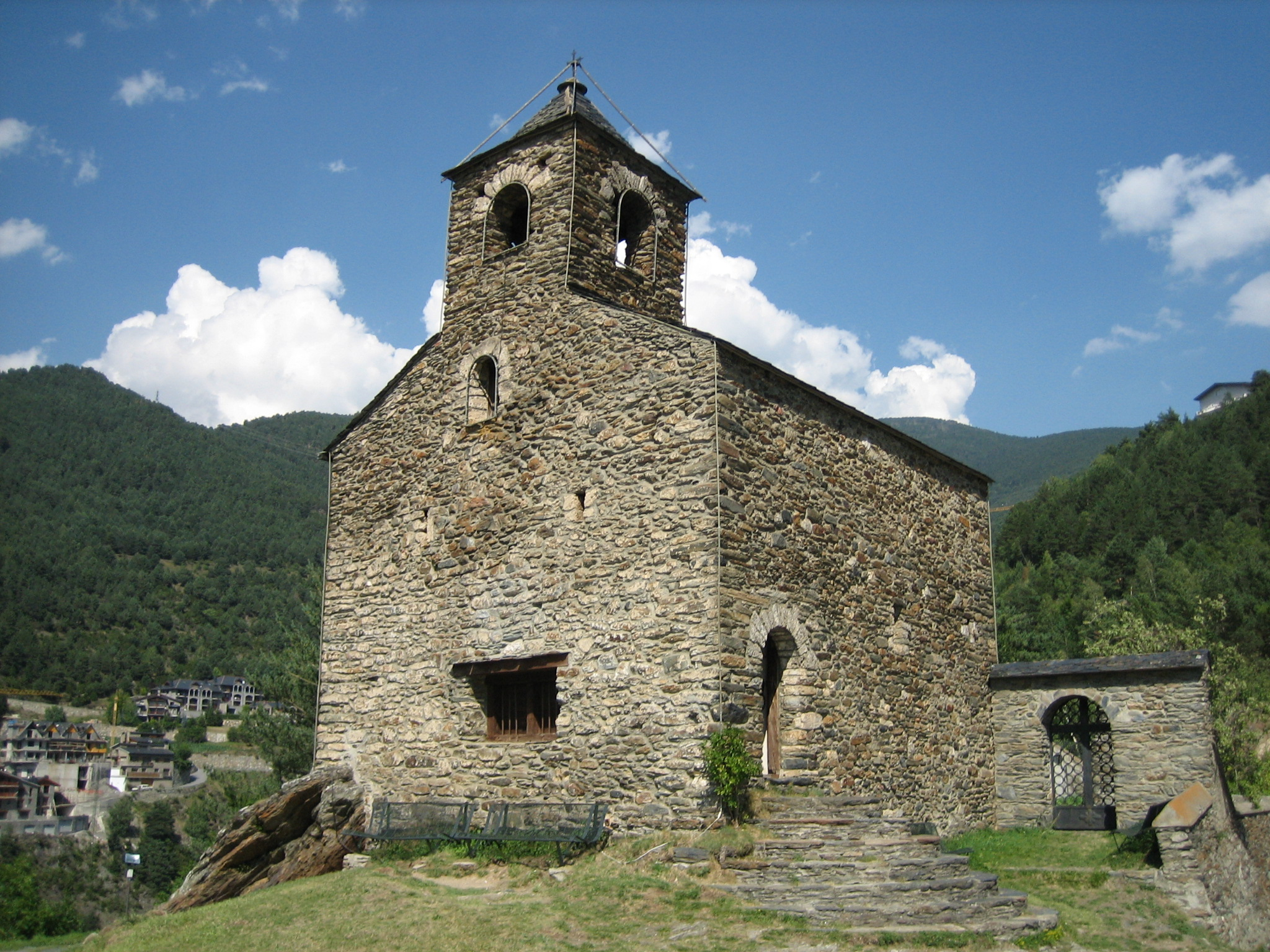 Església de Sant Cristòfol d'Anyós (La Massana, Andorra)